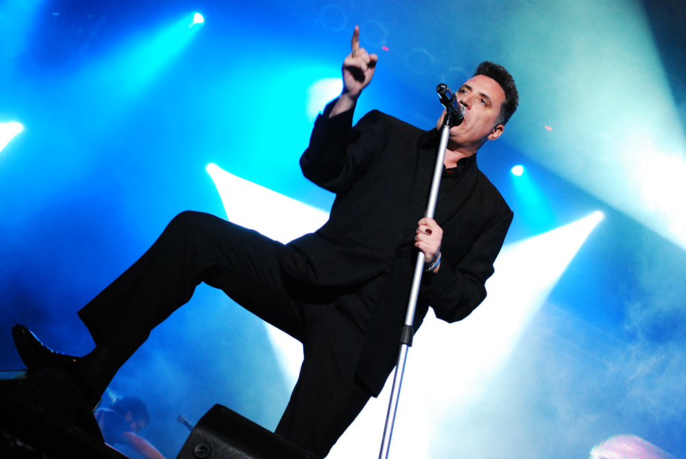 Actuación del músico español Loquillo en el "Ancel Fest 2008", en Uruguay.